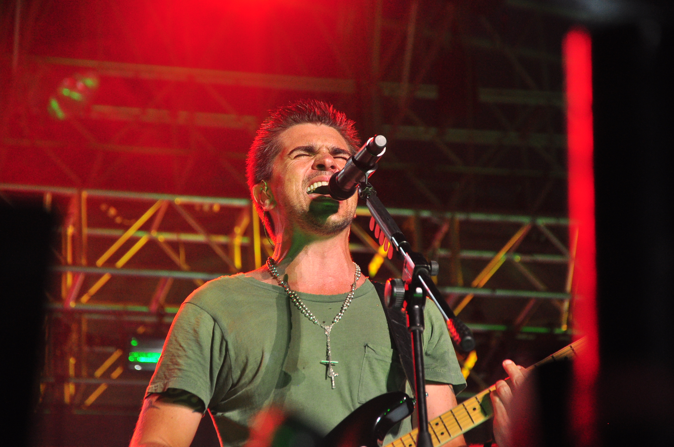 Juanes en el Festival Presidente De Musica Latina 2010, Estadio Olimpico.